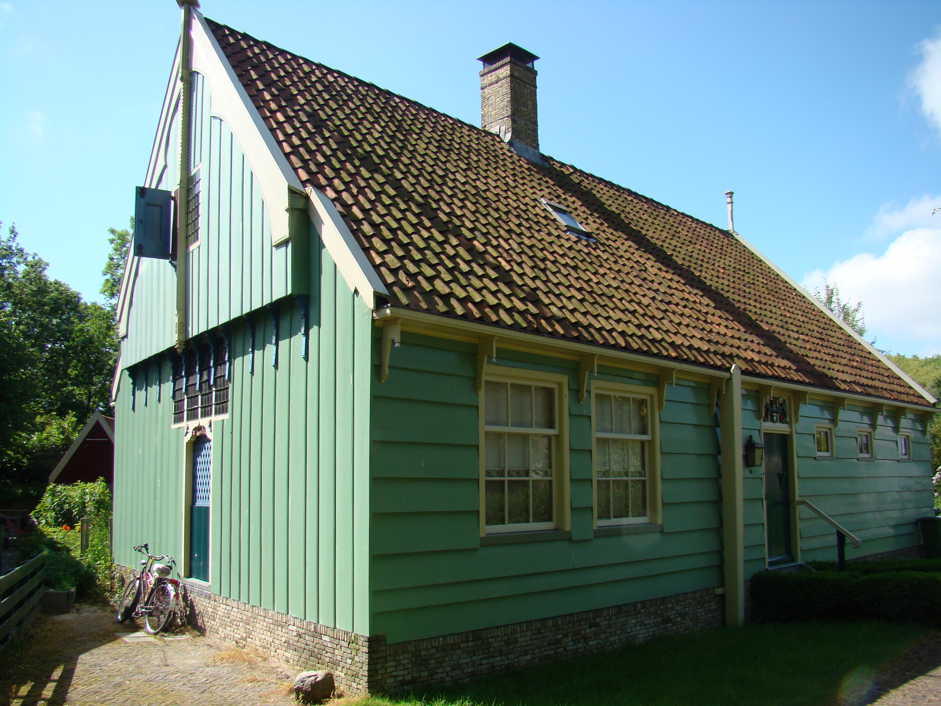 Rijksmonumenten in Broek in Waterland, Netherlands Laan 18